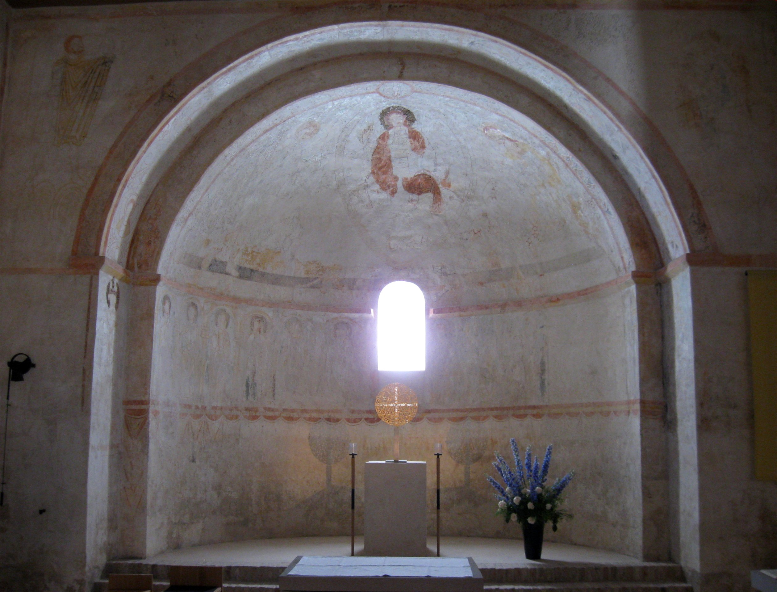 Keferloh; St. Aegidius, Katholische Kirche, romanische Anlage, geweiht im Jahr 1173. Innenraum